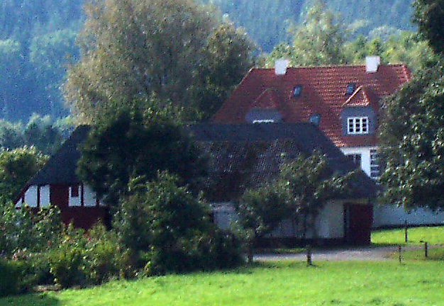 Skjern Hovedgård, Viborg Kommune, Denmark